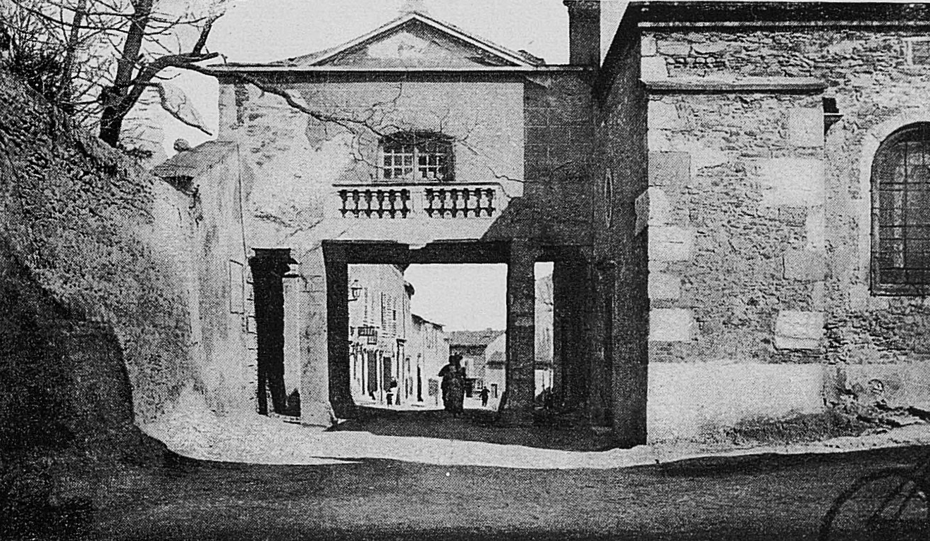 Dictionnaire illustré des communes du département du Rhône. Tome 1 / par MM. E. de Rolland et D. Clouzet.